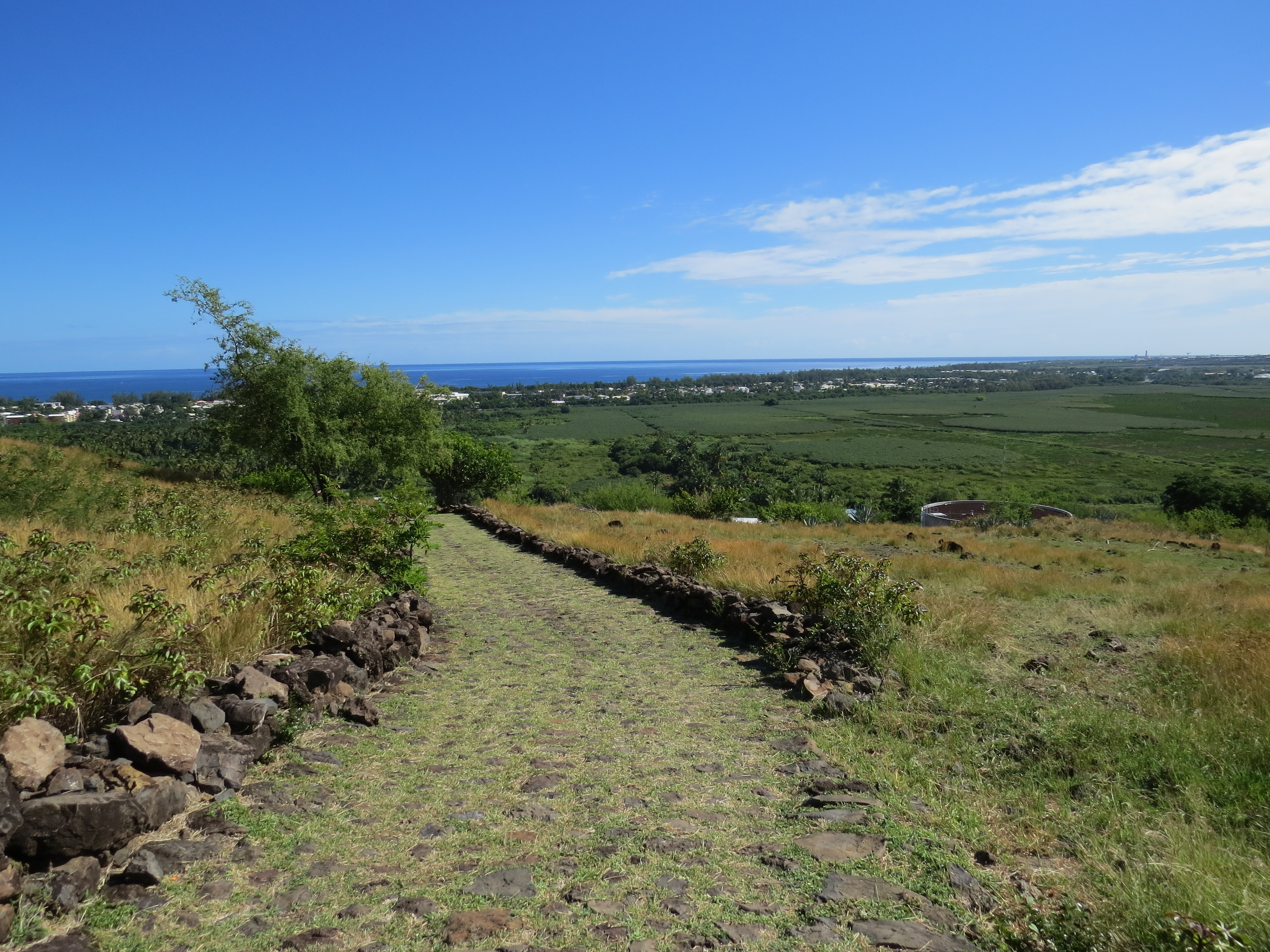 Chemin historique entre Bellemène et le Tour des roches à Saint-Paul (île de la Réunion), passant par la savane (1er plan), l'étang de Saint-Paul (2e plan) et la frange littorale urbanisée en bordure de la baie de Saint-Paul (arrière-plan)